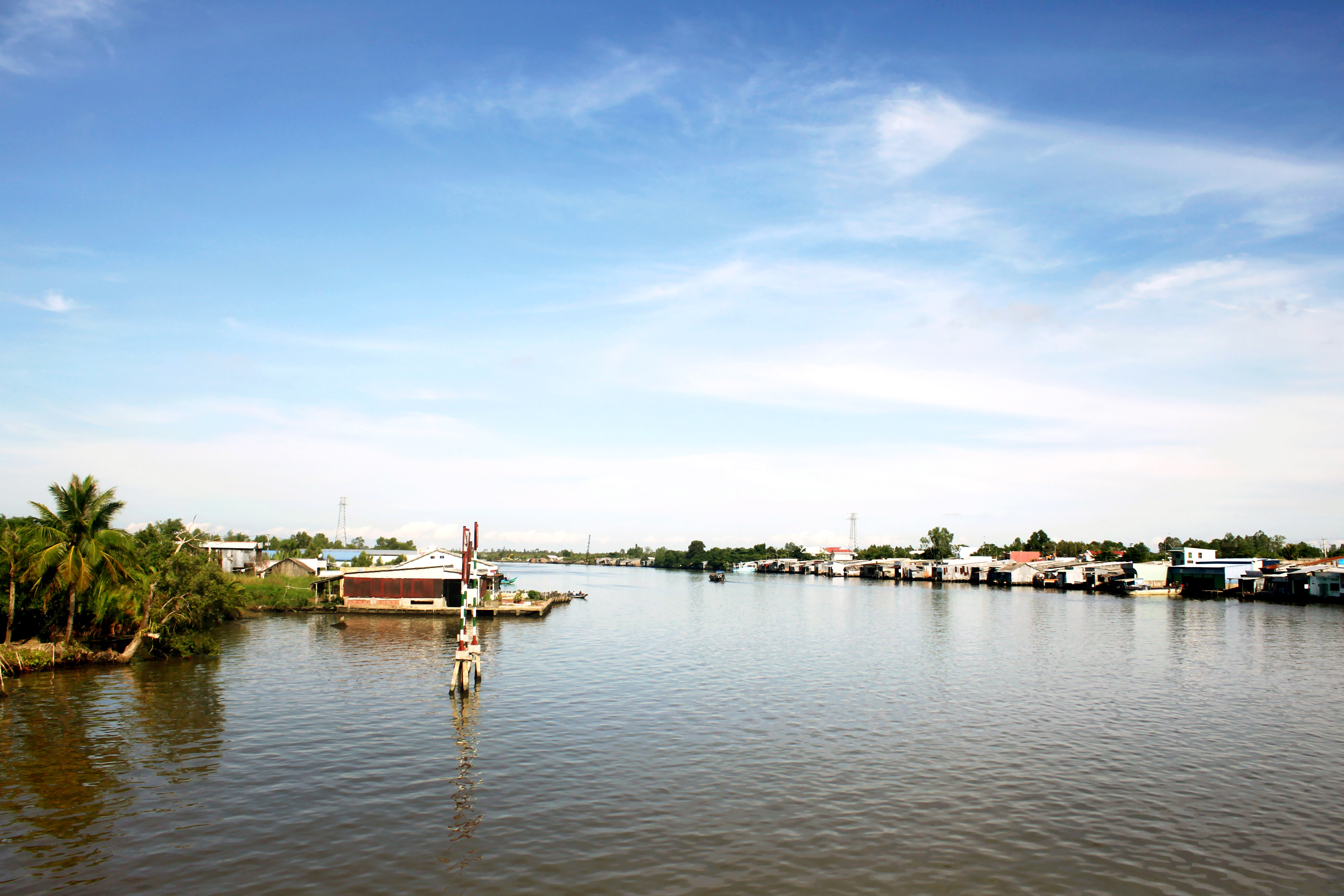 Sông Đốc ở thị trấn Sông Đốc, thuộc huyện Trần Văn Thời, tỉnh Cà Mau, Việt Nam.